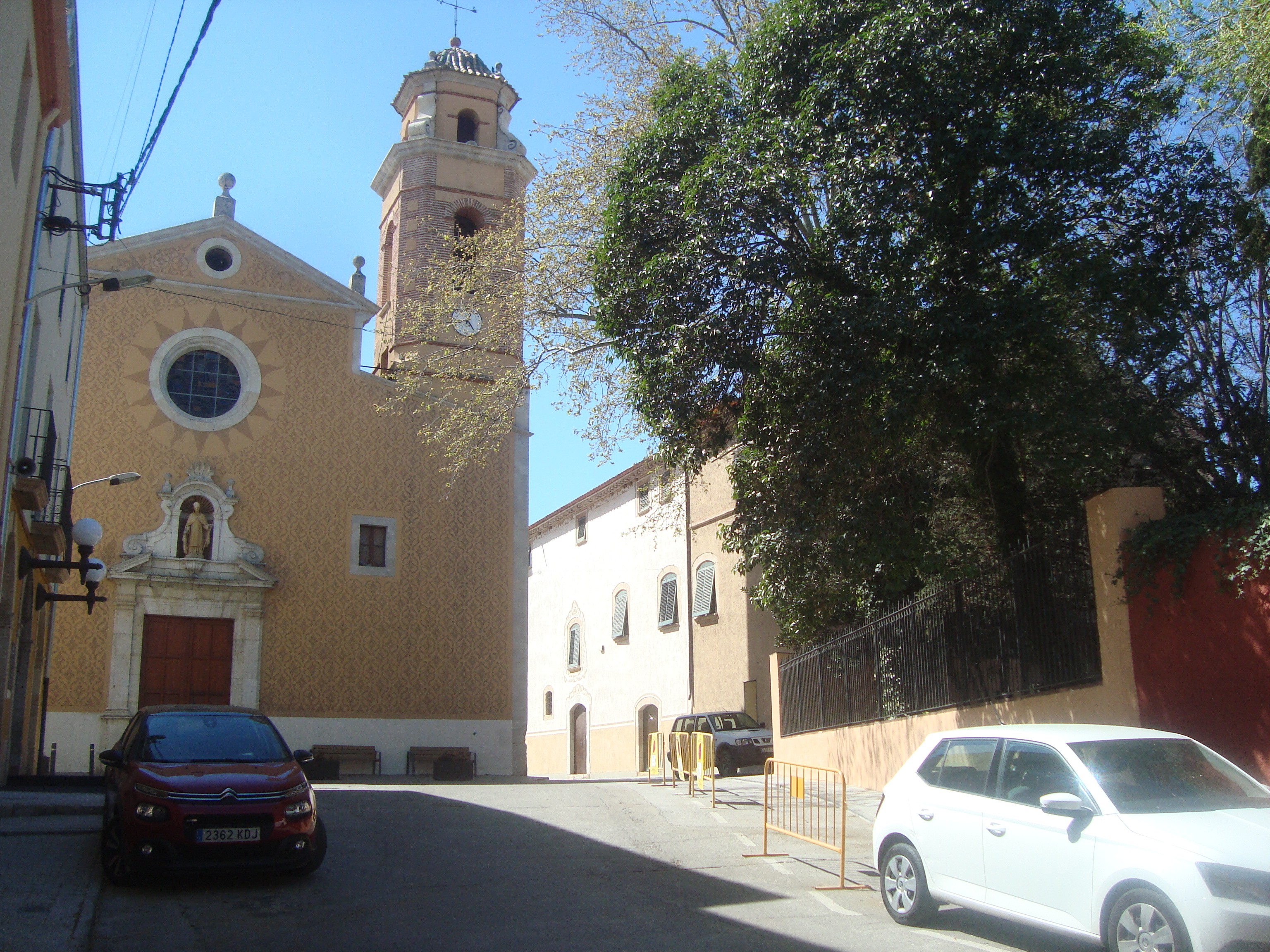 Església parroquial de Sant Martí (el Morell)